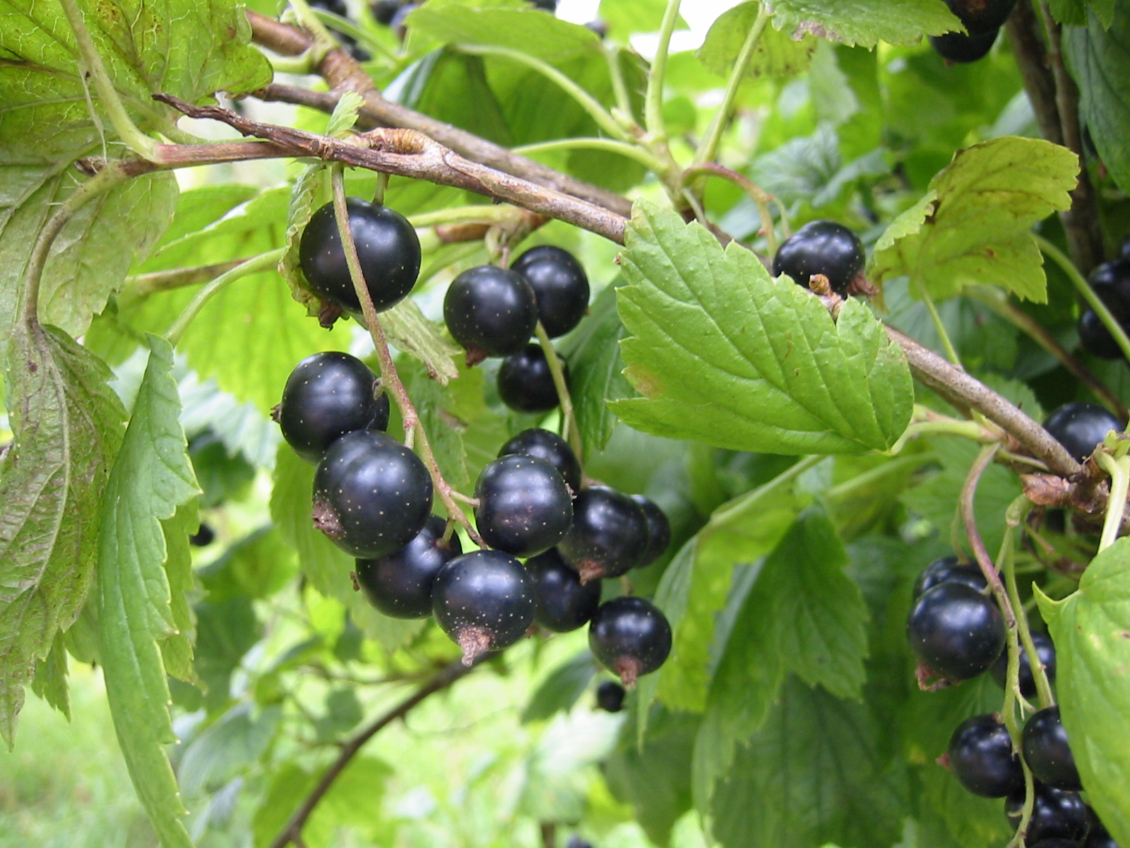 Svart vinbär